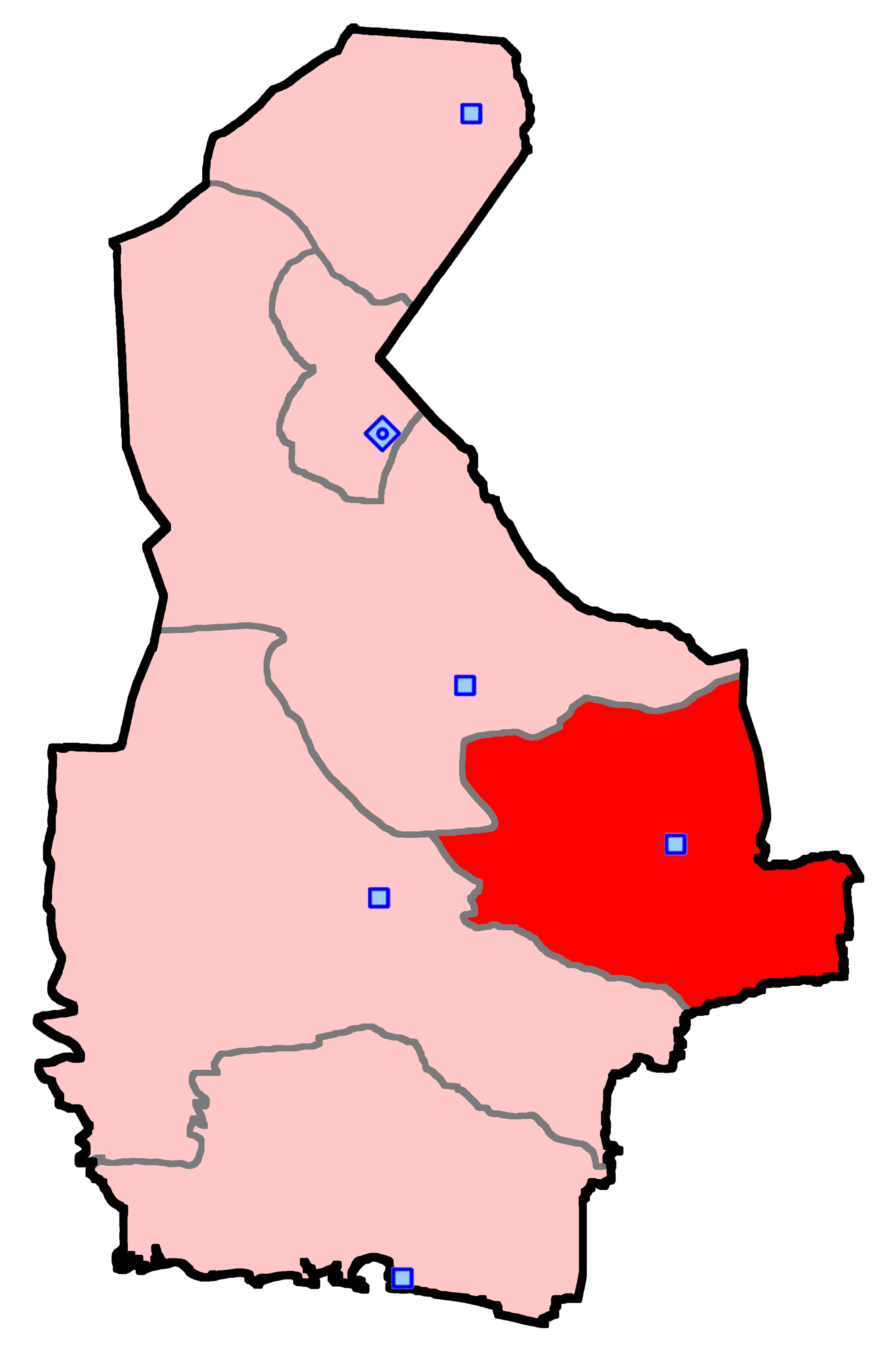 حوزه‌ سراوان برای انتخابات مجلس شورای اسلامی